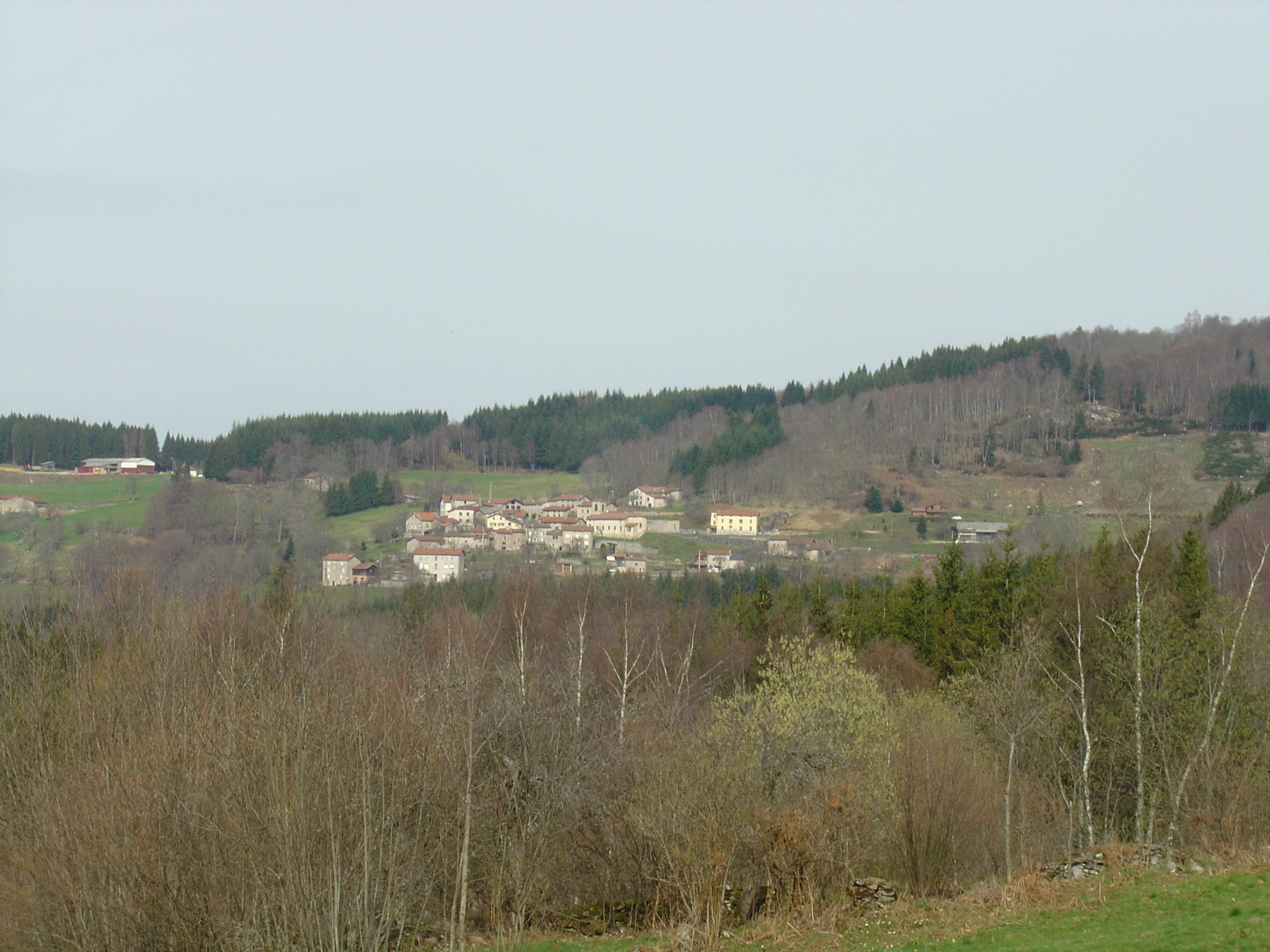 Vue générale du village de La Renaudie dans le Haut-Forez Auvergne- Puy-de-Dôme (63)